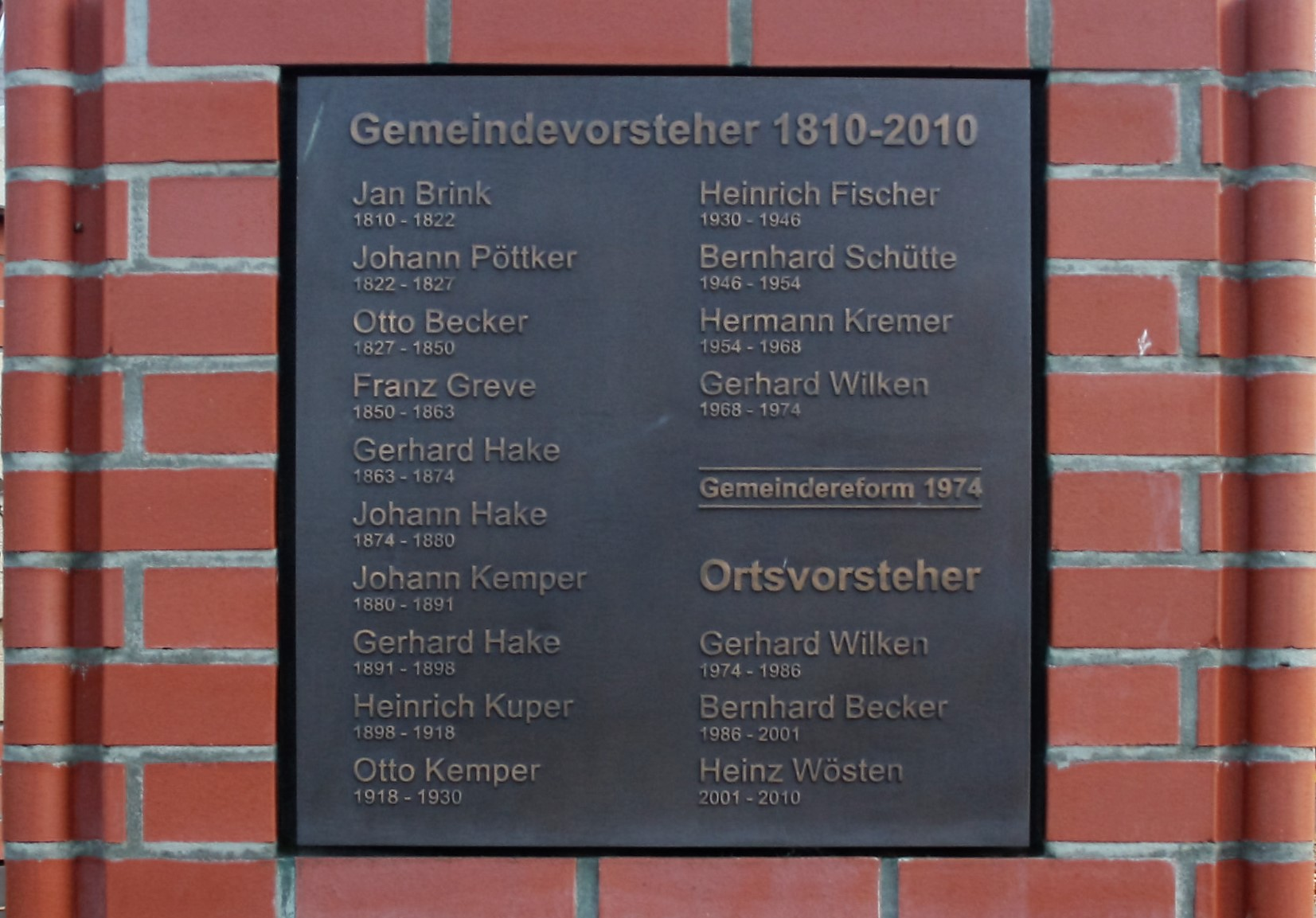 Denkmal zum 200 jährigem Jubiläum "Gemeinde und Ortsvorsteher zu Altenberge Kupferstich